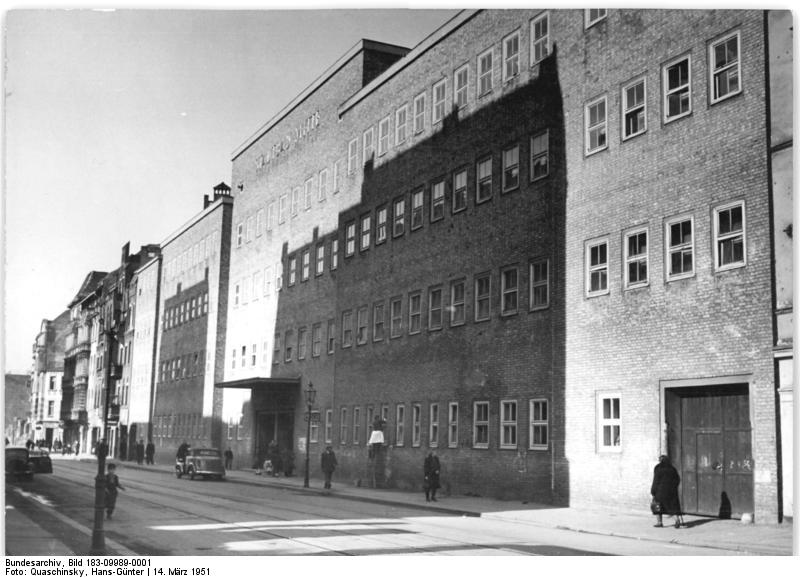 Berlin, Stadtbad Mitte, Hallenbad Illus Quaschinsky 14.3.1951 Im Stadtbad Mitte in Berlin. Das Stadtbad Mitte gehört zu den bekanntesten Hallenbädern Berlins. In diesem Bad, wo oft Schwimmwettkämpfe stattfinden, werden auch zu den Weltfestspielen der Jugend und Studenten Veranstaltungen abgehalten werden. UBz: Außenansicht des Stadtbades.